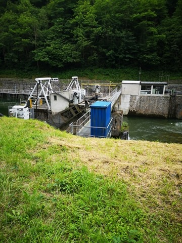 Installation de régulation pour la production hydroélectrique sur le Salat dans les gorges de la Ribaute (Ariège)